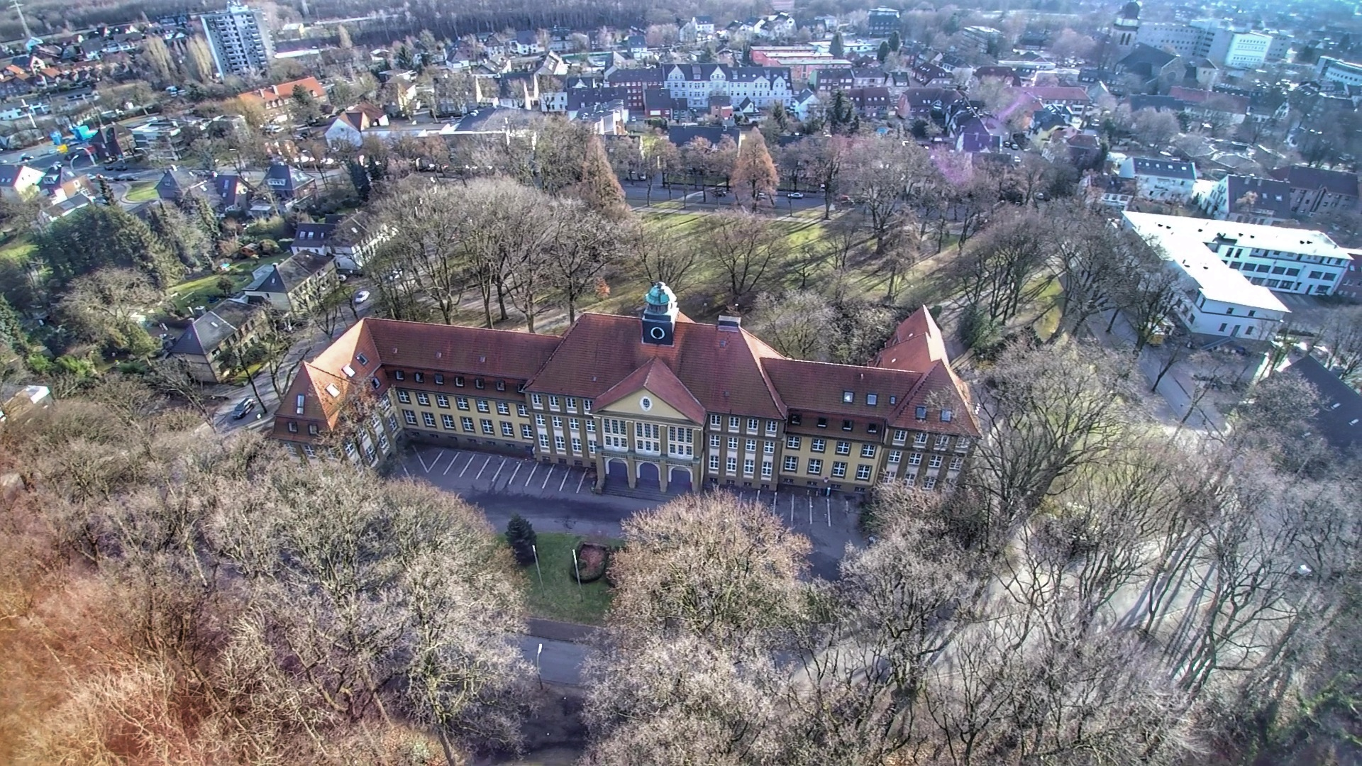 Das Rathaus von Datteln aus der Luft fotografiert.